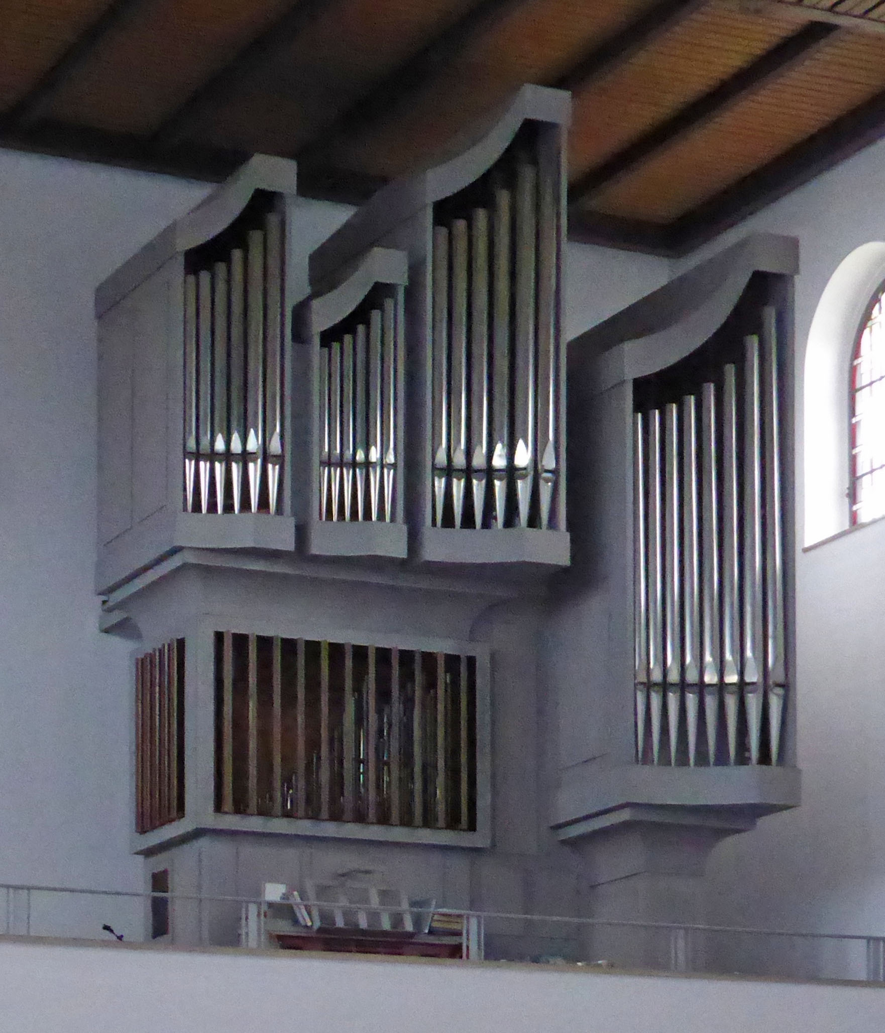 Orgel in der St.-Bernward-Kirche in Wolfsburg.